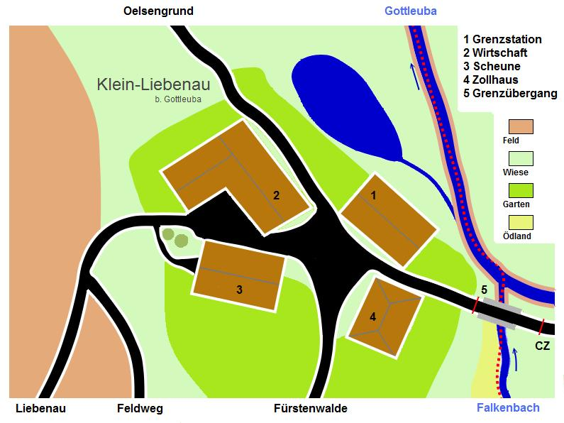 Ortsplan